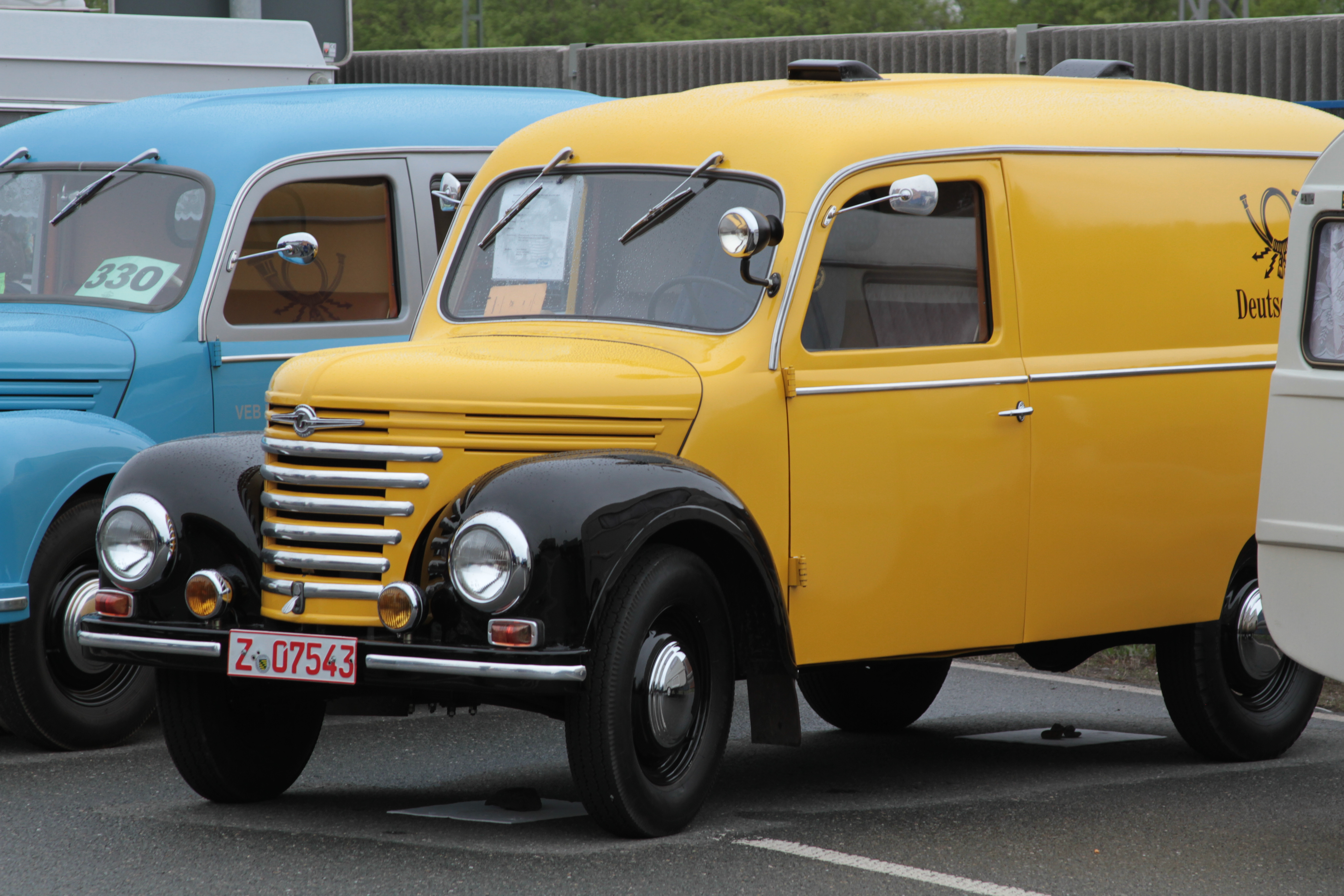 16. IFA Oldtimertreffen Werdau 2013, Germany